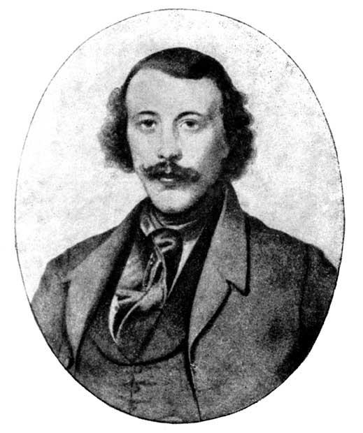 Young Mikhail Bakunin